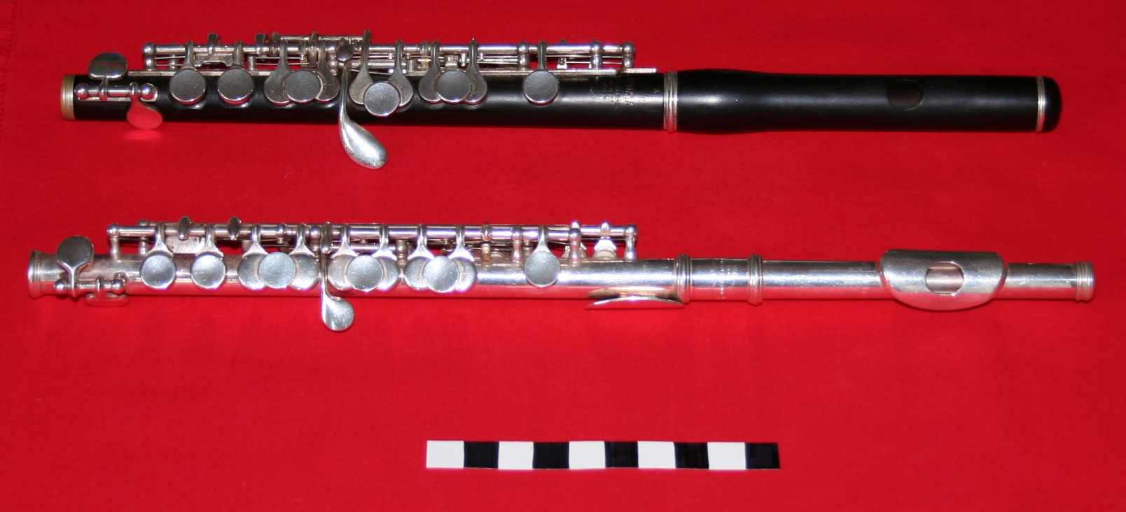 Querflütt: helzen a metallen Piccoloflütt (Moossstaw = 10 cm).